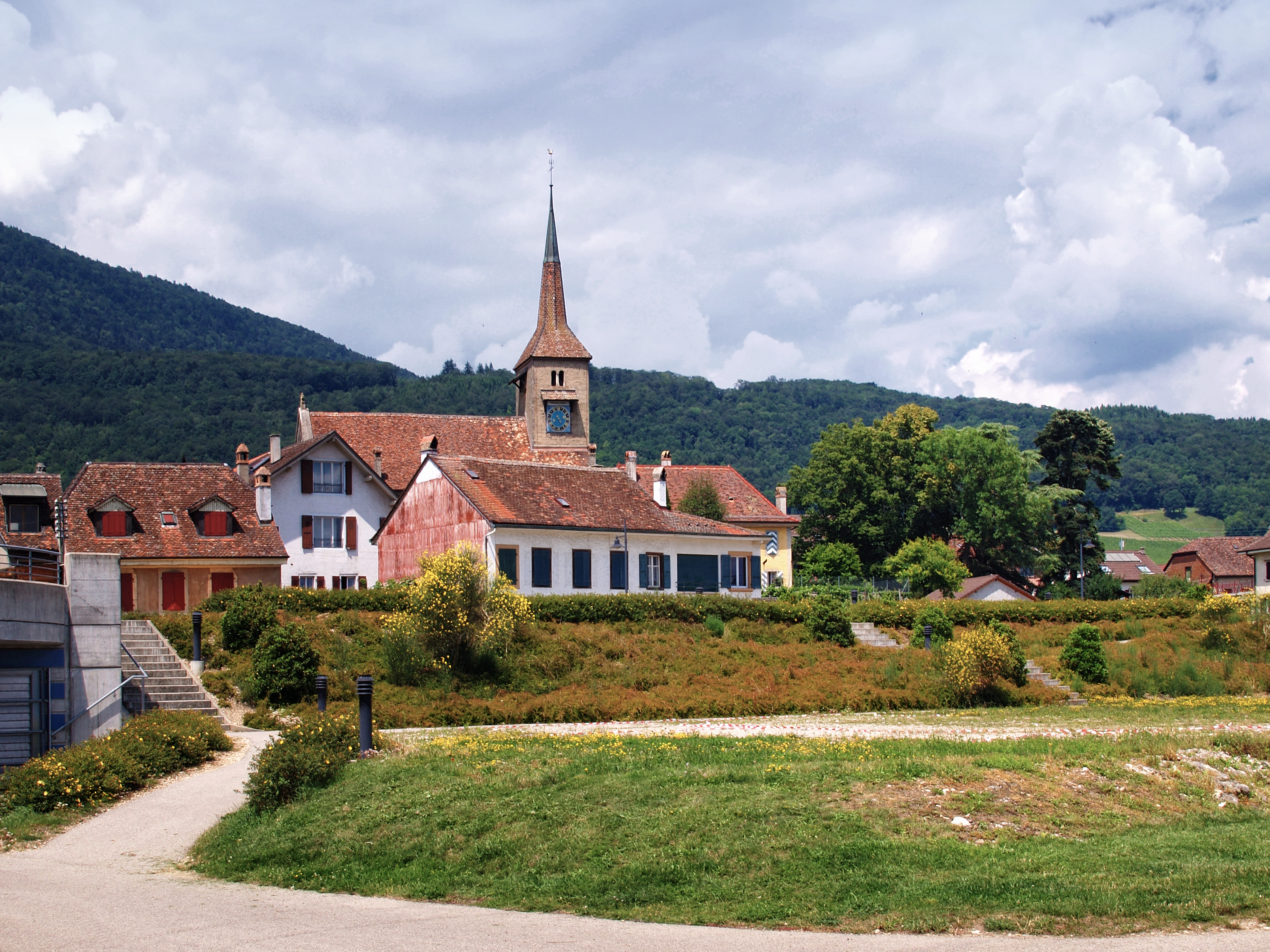 Concise (Suisse) - Église Saint-Jean Baptiste